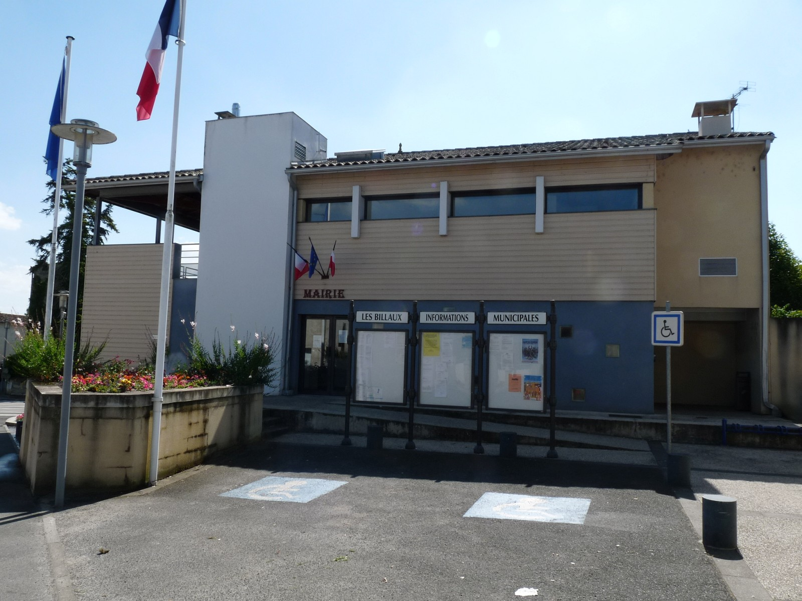 Mairie des Billaux, Gironde, France